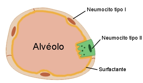 Esquema en el que se representa el alveolo pulmonar. Son visibles los neumocitos tipo I y II.